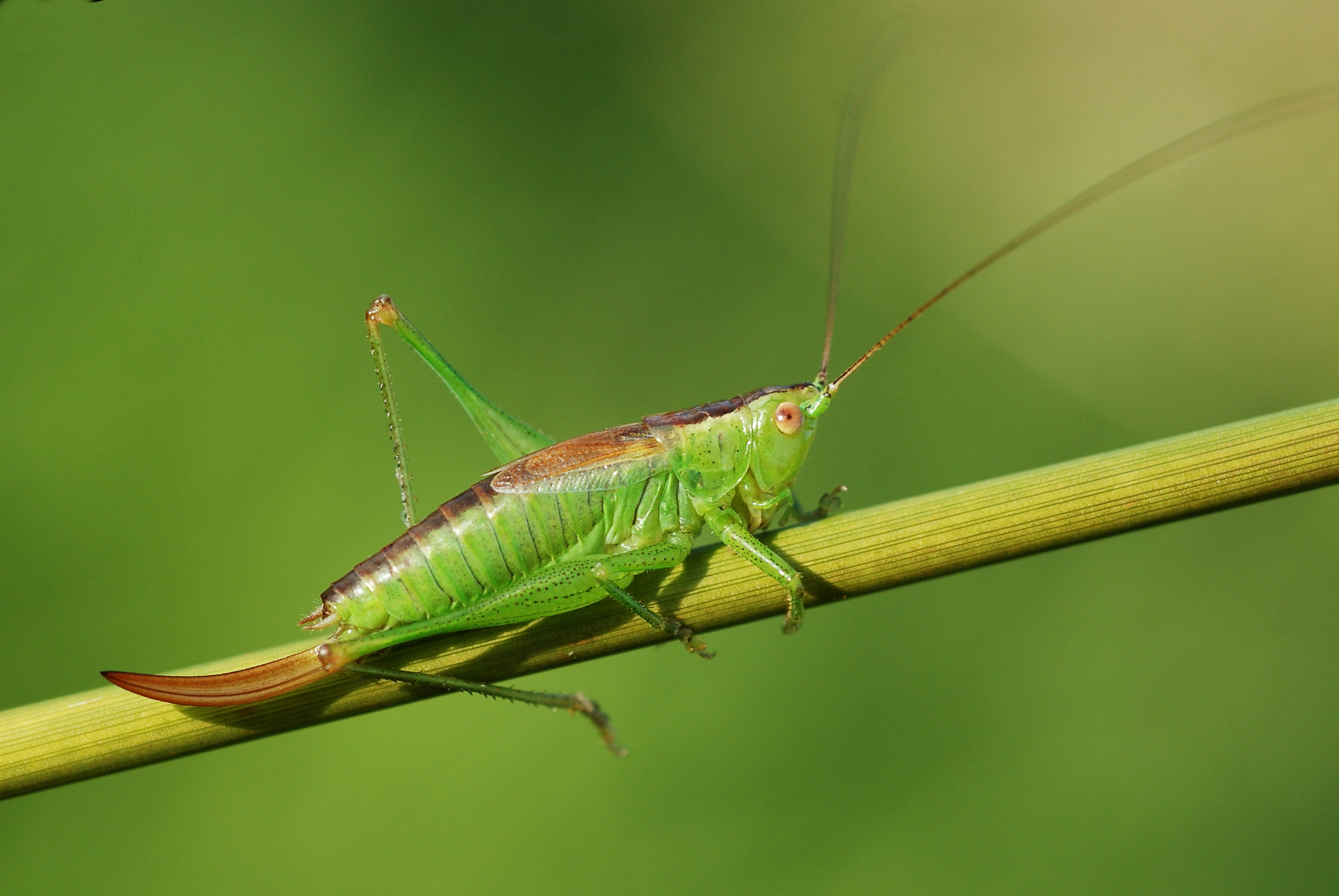 Conocephalus dorsalis female